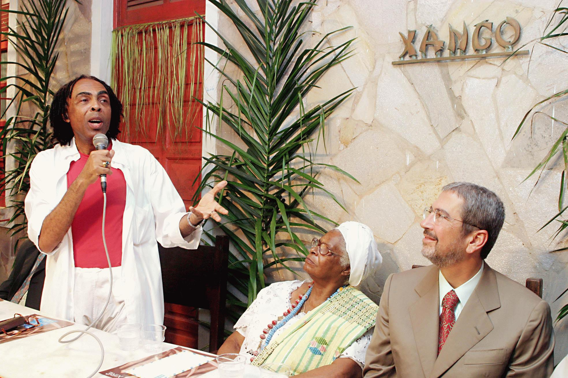 Ministro Gilberto Gil, discursa sob os olhares de mãe Stella e do prefeito de Salvador, Antônio Imbassahy em Salvador, Bahia